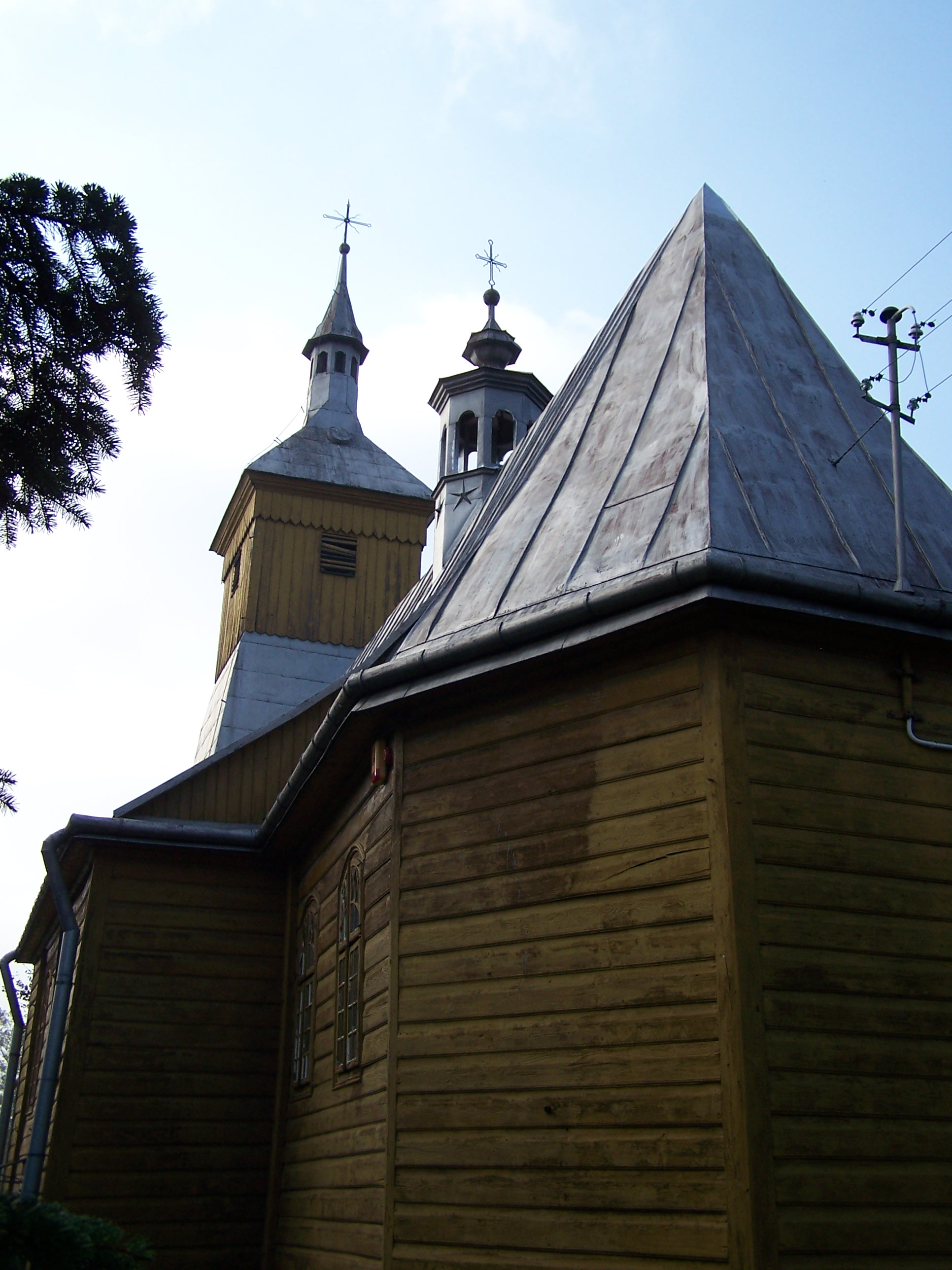 Stary zabytkowy kościół drewniany w Soninie